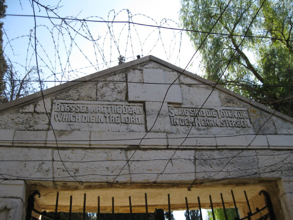 בית הספר גובאט הוא בית ספר פרוטסטנטי ששימש תחילה כבית ספר מקצועי לנערים ערבים. נקרא על שם סמואל גובאט, הבישוף הפרוטסטנטי של ירושלים שהקים אותו. מ-1967 שוכן בו מכון אמריקאי לחקר ארץ הצבי, מכללה אוניברסיטאית אמריקאית. בחצר המכון שוכן בית הקברות הפרוטסטנטי.